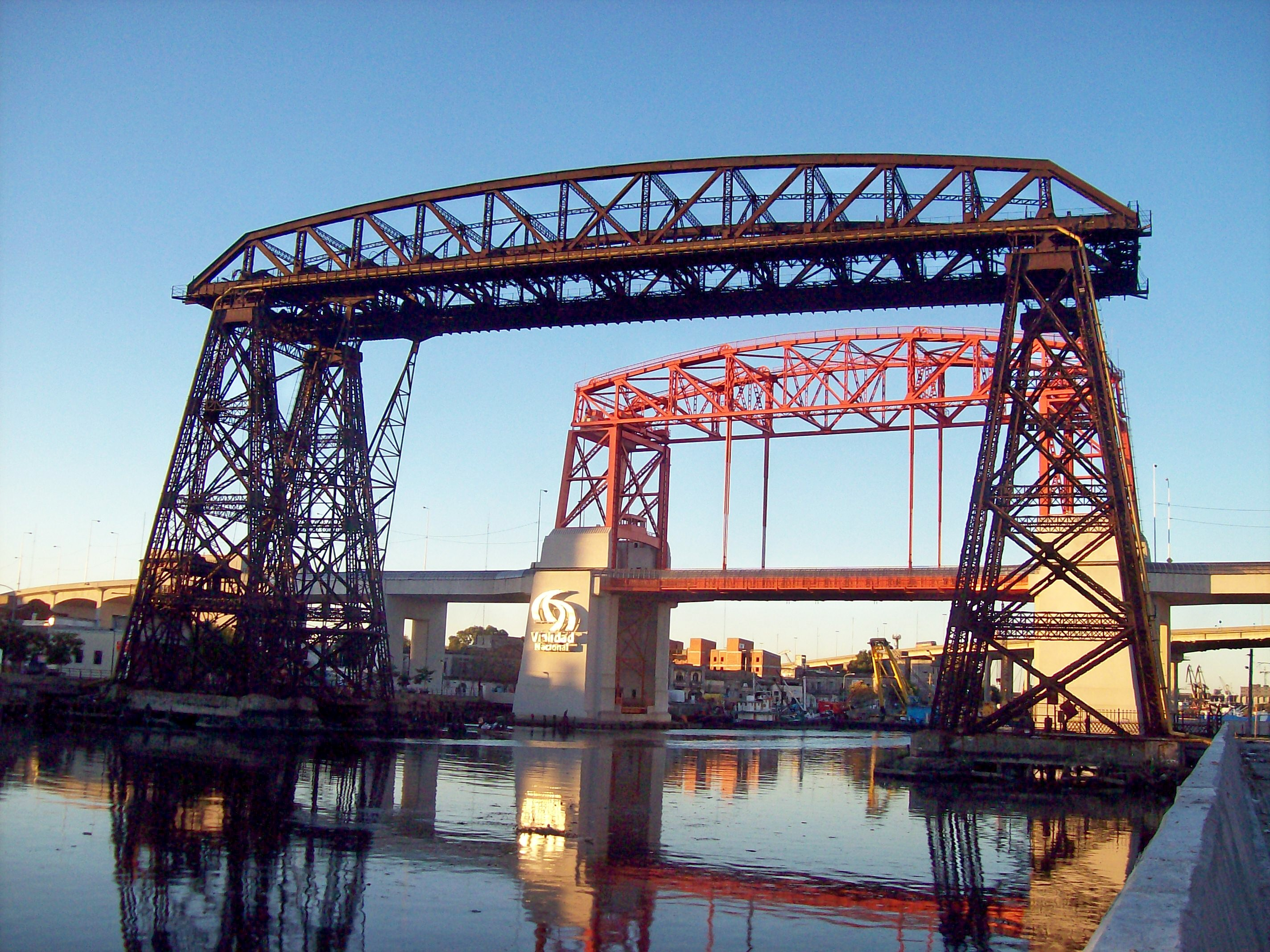 Viejo Puente Transbordador Nicolás Avellaneda, en La Boca, Buenos Aires. Detrás se ve el Nuevo Puente Pueyrredón.